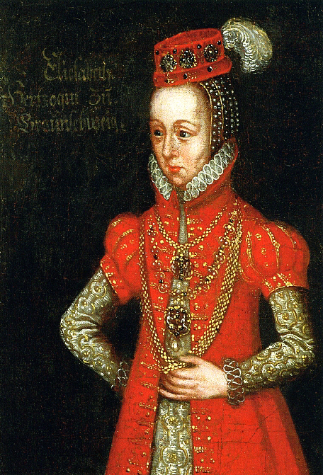 Portrait of Elisabeth von Brandenburg (1510-1558)